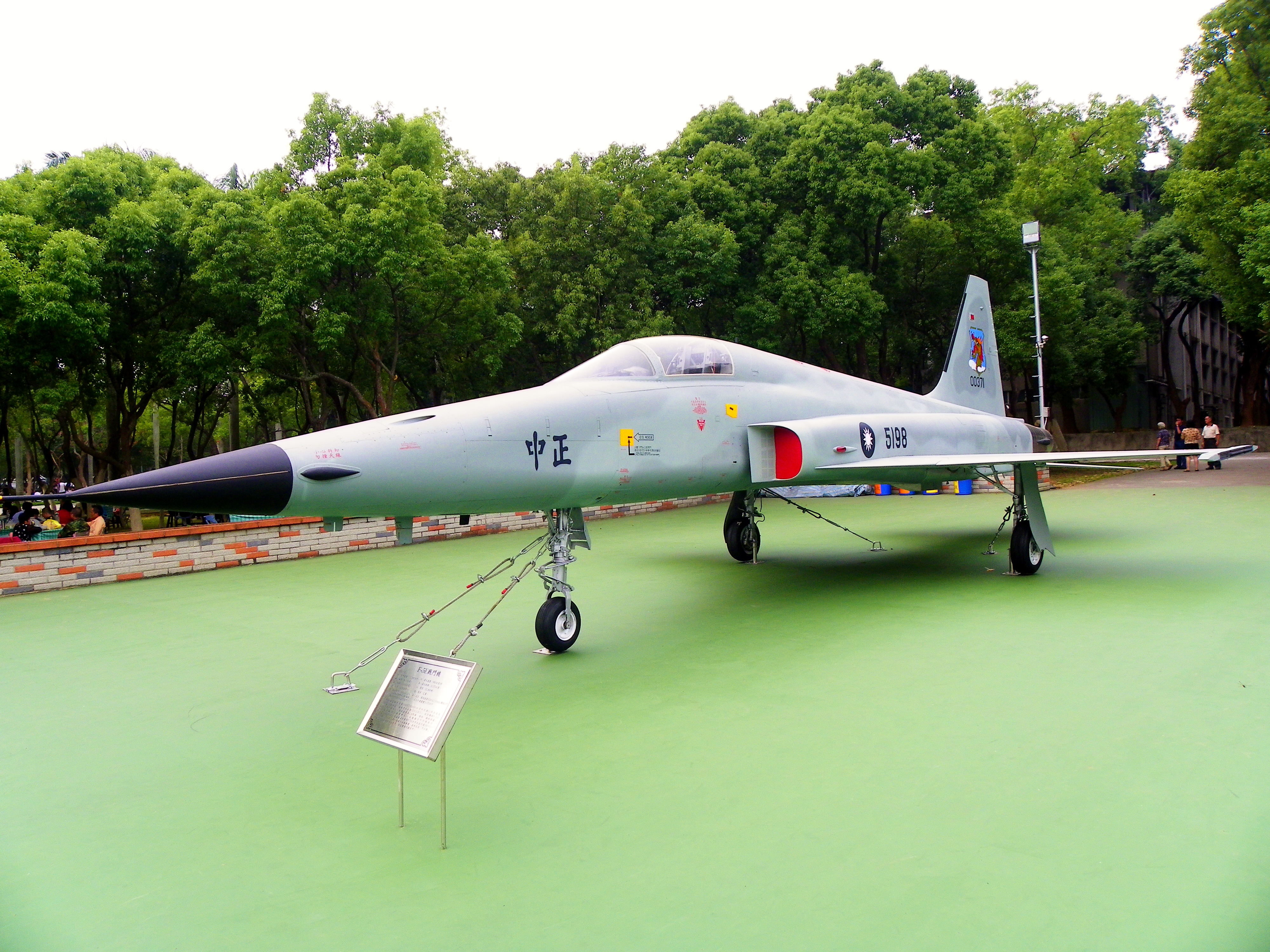 成功嶺保存的中華民國空軍F-5E （塗裝編號5198）。